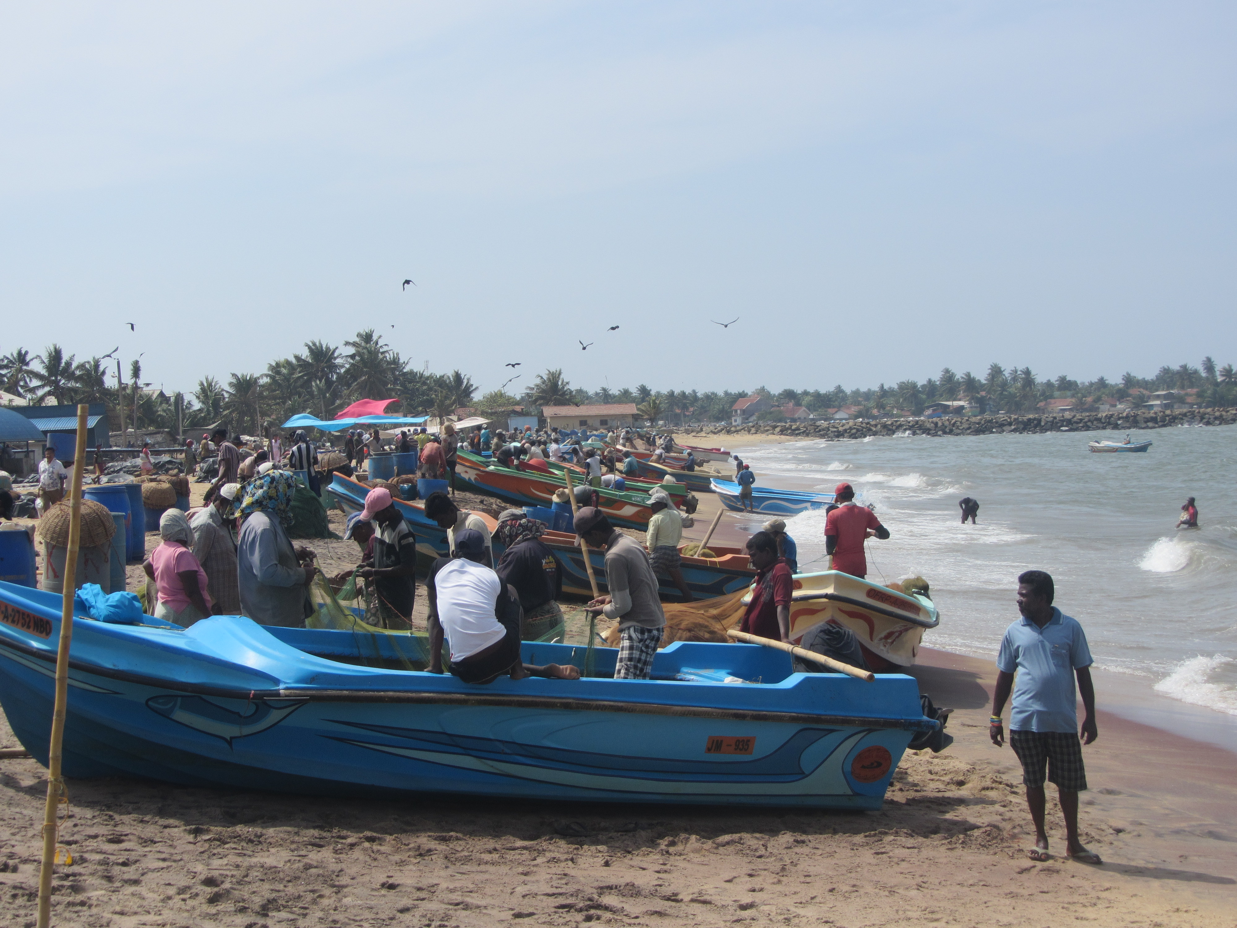 Fischer am Fischmarkt von Negombo.